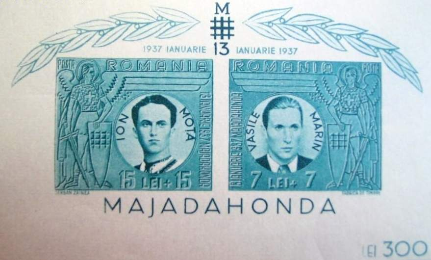 Mărci poştale din 1941 care îi comemorează pe Ion Moţa şi Vasile Marin.